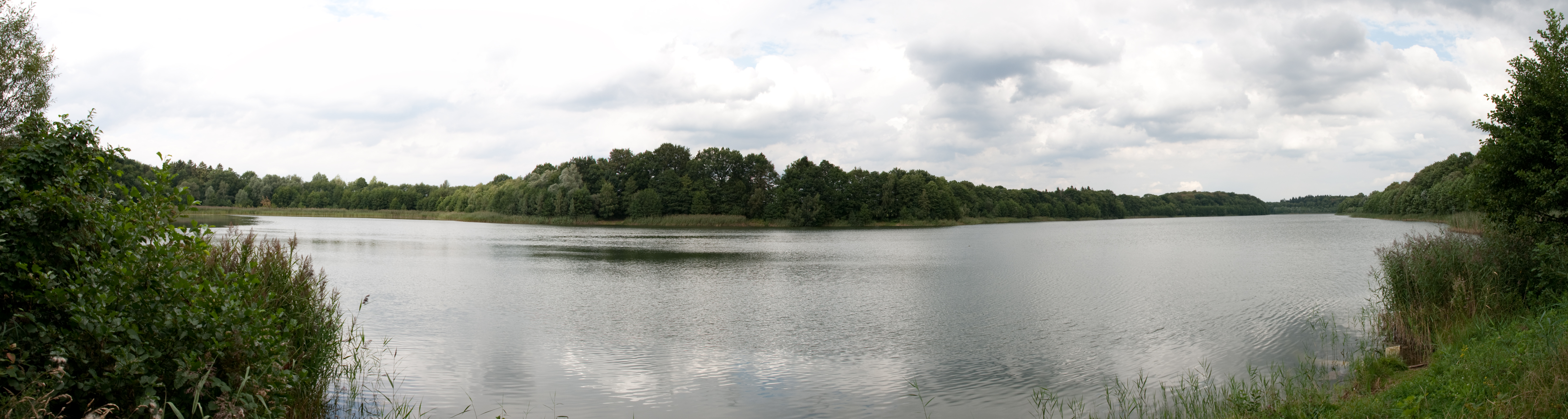 Panorama des Kogeler Sees, Fotografiert vom Südufer. Hinter dem Fotografen befand sich die Pumpstation des Sees.